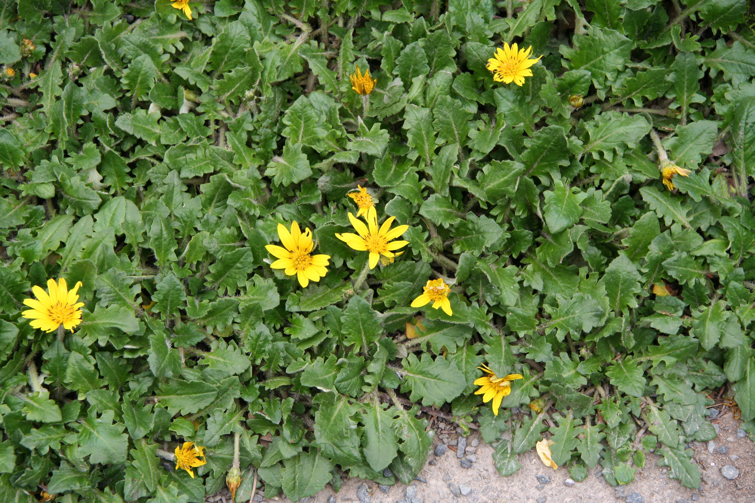 Haplocarpha cheilanthifolia im Botanischen Garten Dresden